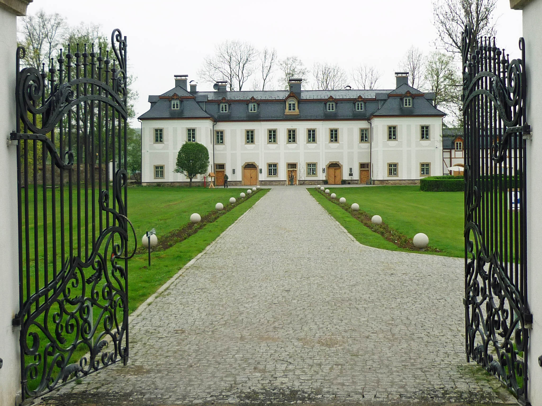 Pakoszów, Woiwodchaft Niederschlesien (Wernersdorf im Hirschberger Tal) - Schloss